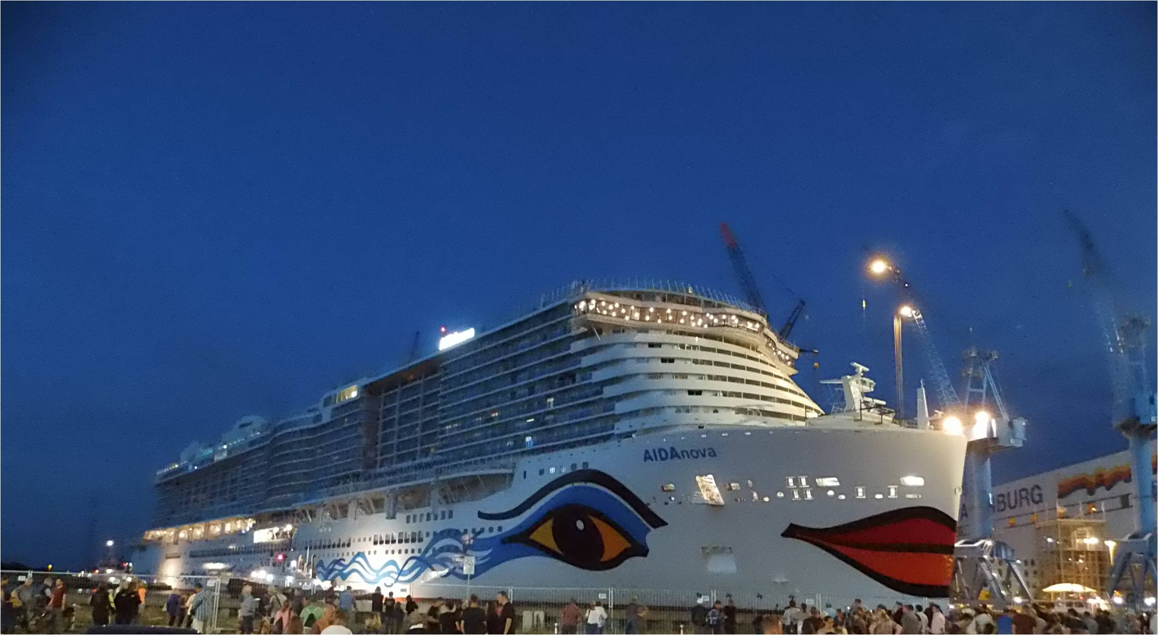 AIDAnova after launch.